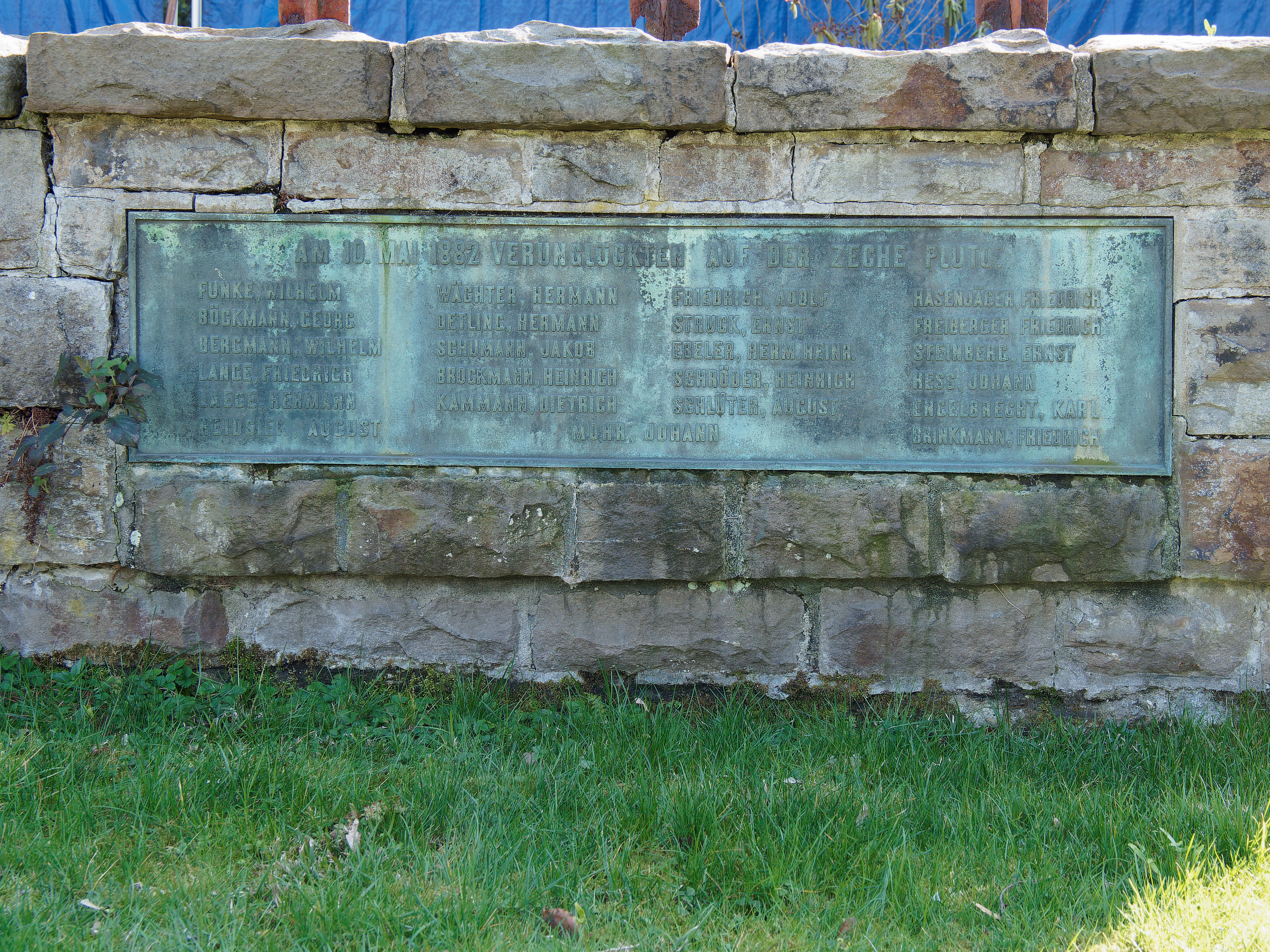 Denkmal für die in der Zeche Pluto in Herne-Wanne-Eickel 1882 verunglückten 23 Bergleute auf dem Friedhof an der Lohofstraße im Stadtteil Eickel, Tafel mit Namen.